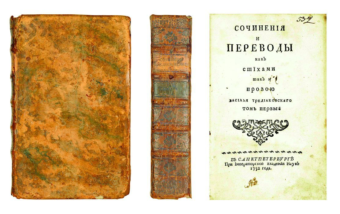 Обложка, корешок и титульный лист «Сочинений и переводов как стихами, так и прозою» В. К. Тредиаковского